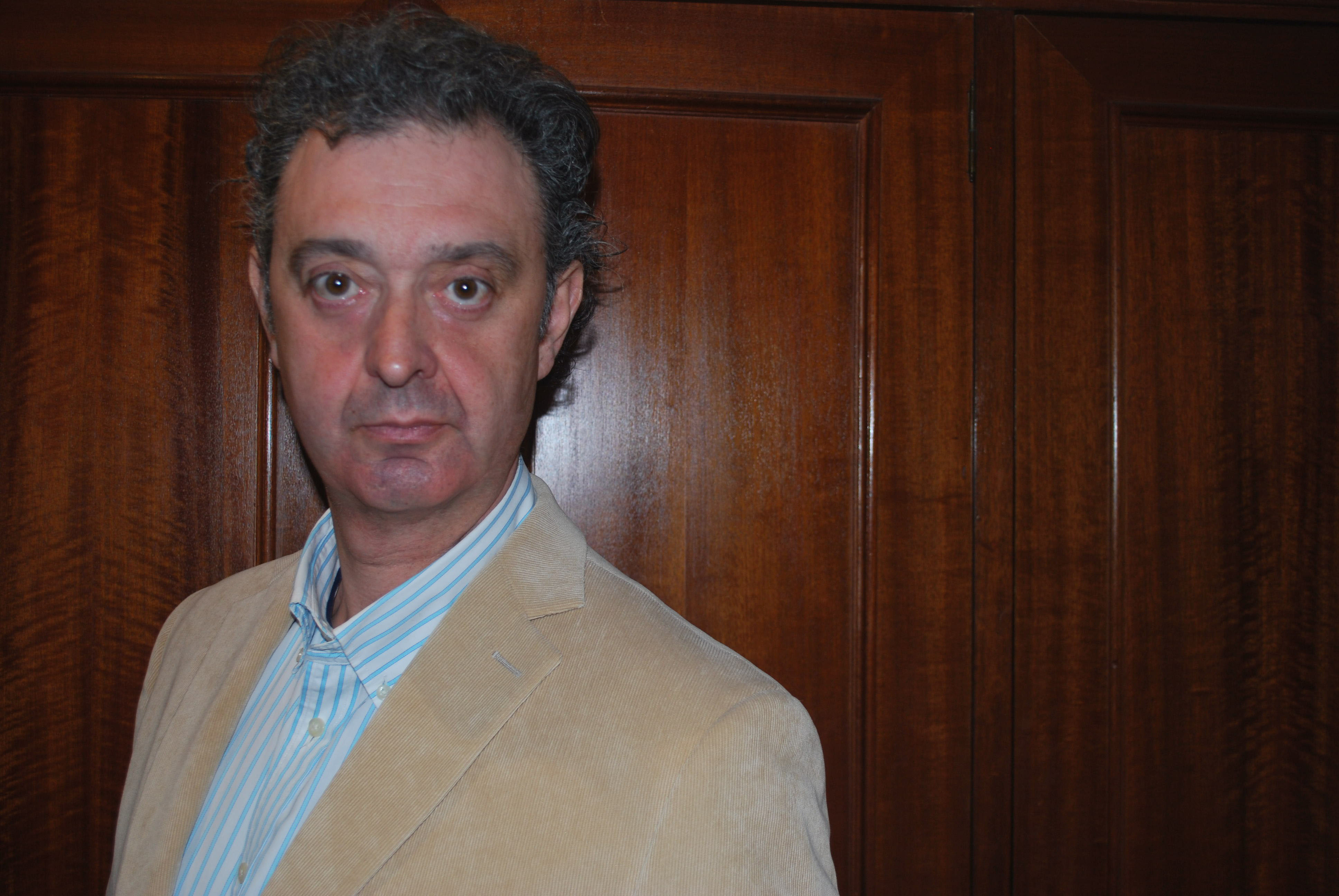 Pablo Pereda